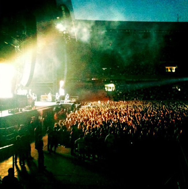 Concert de Green Day au Parc des Princes le 26 juin 2010.